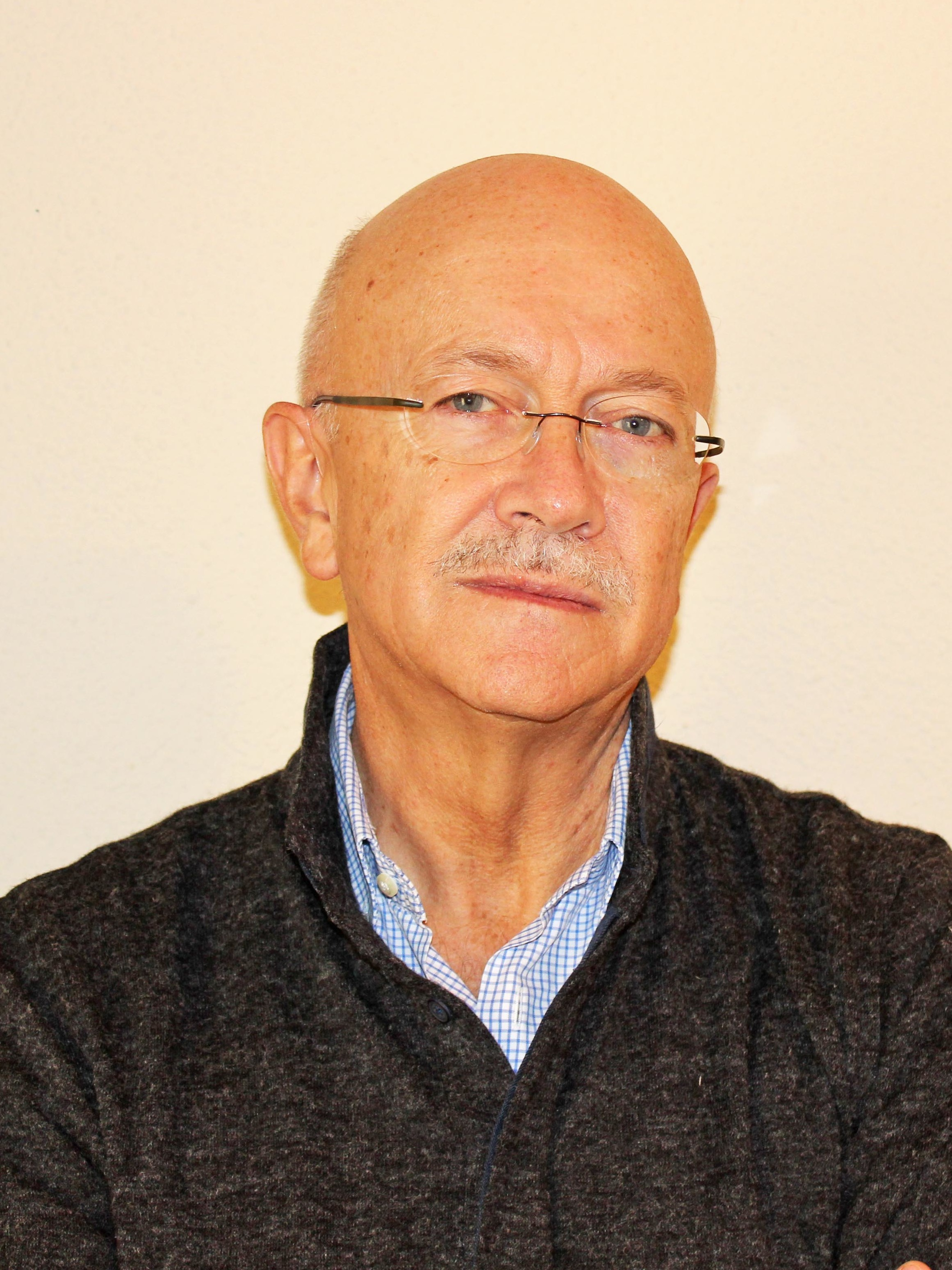 Andrés Ortega Klein (2016)